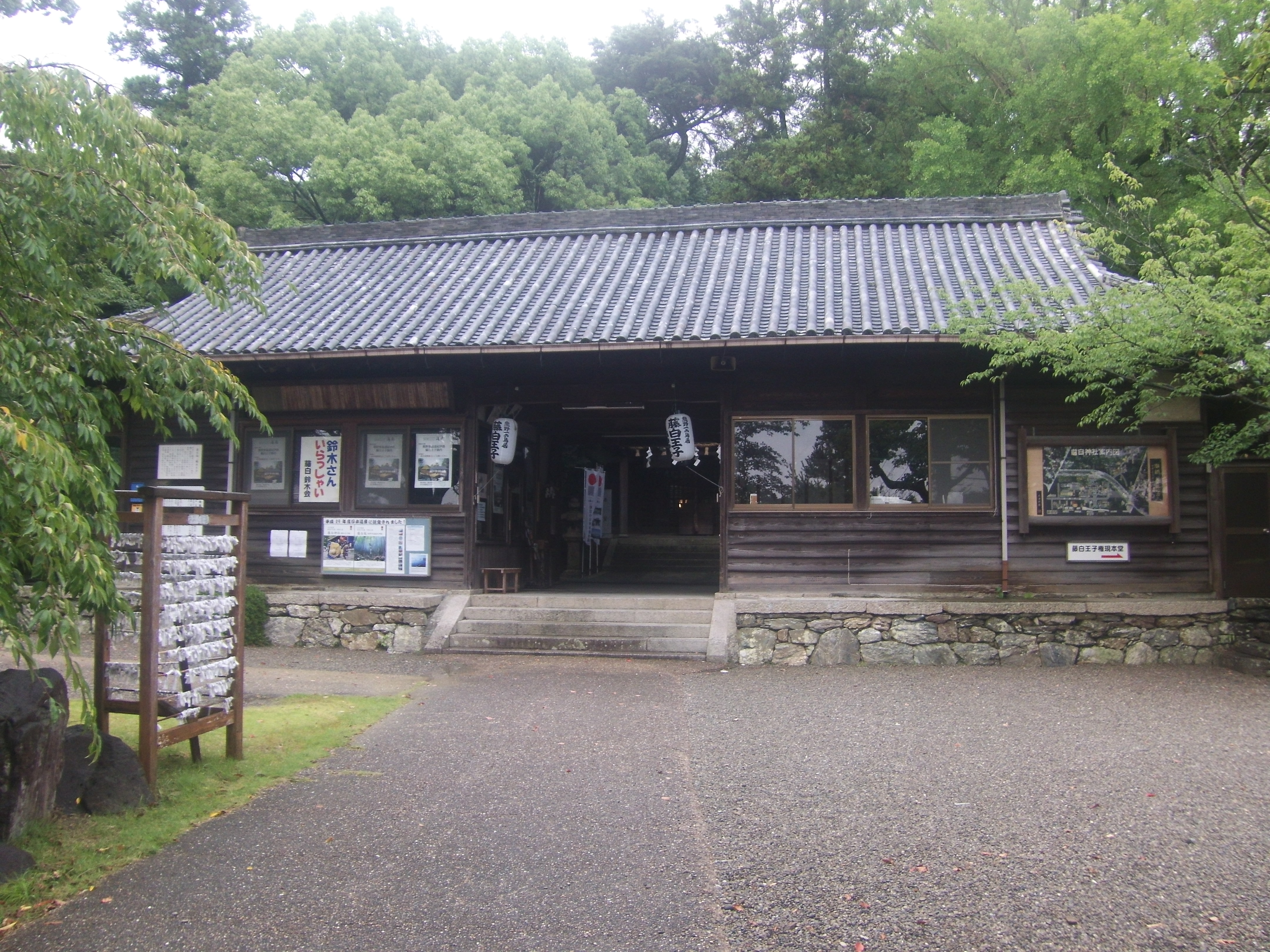 和歌山県海南市の藤白神社